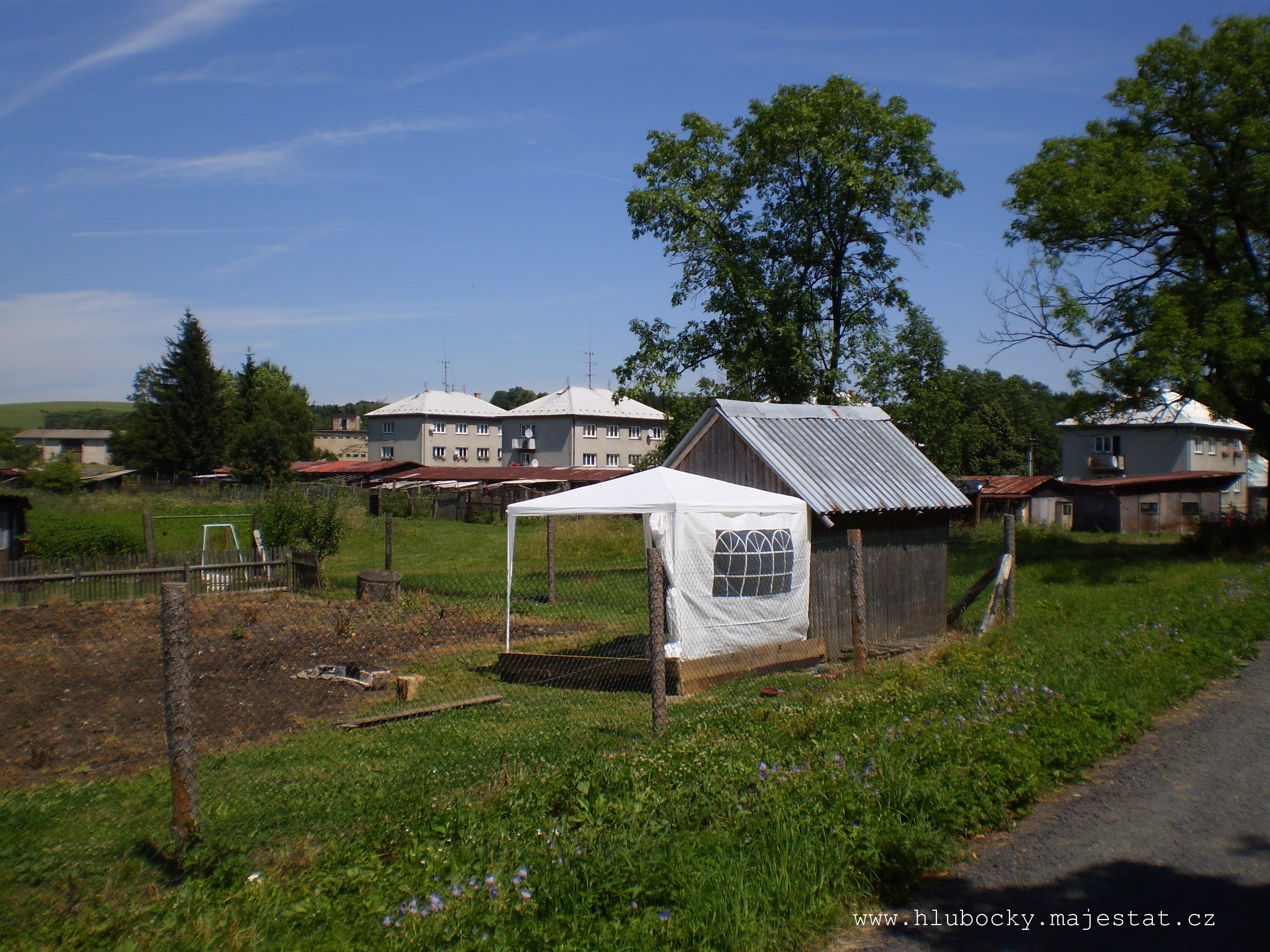 Slavkov, Libavá